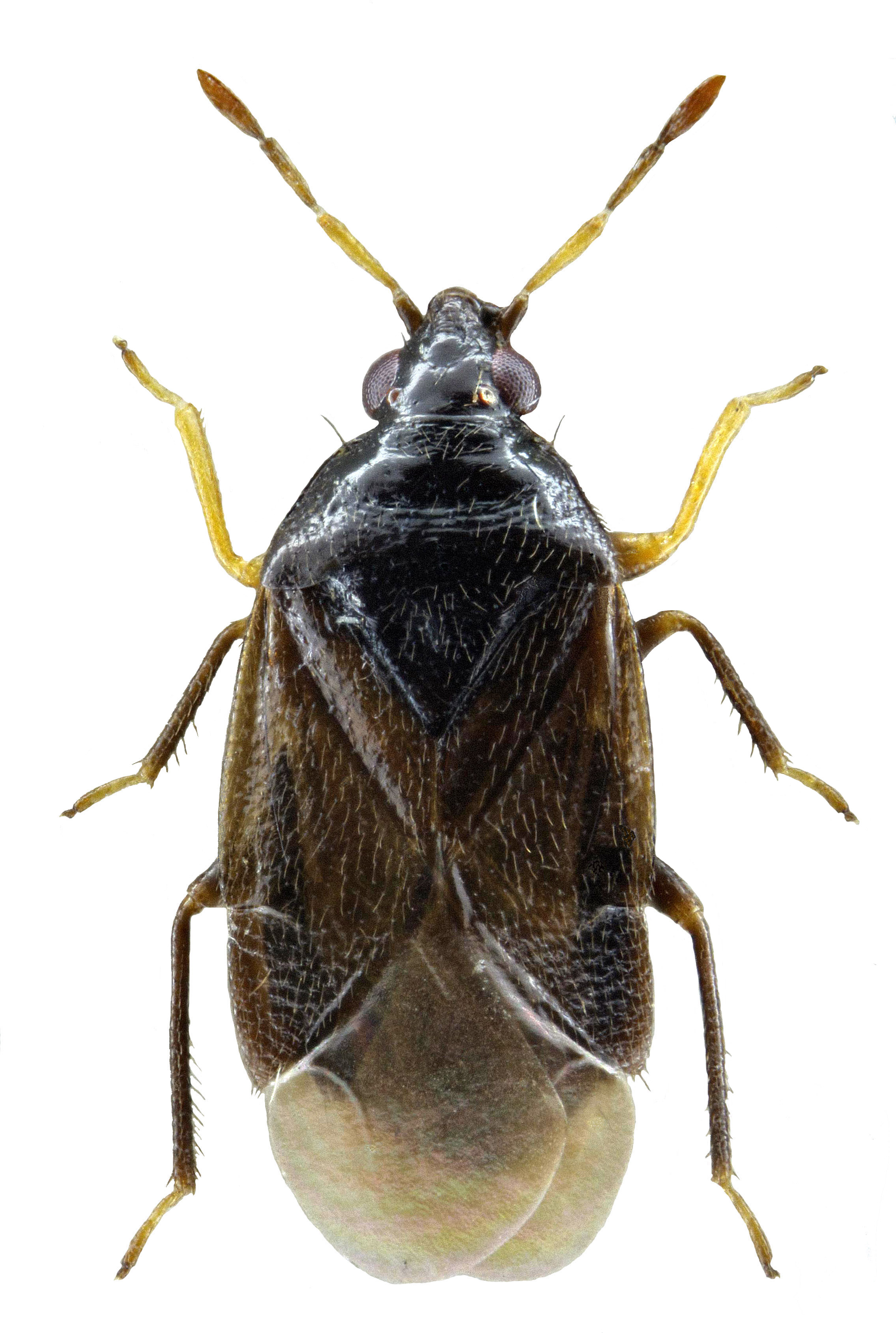 Orius niger, Habitus, specimen in Zoologische Staatssammlung München, Foto: Marianne Müller